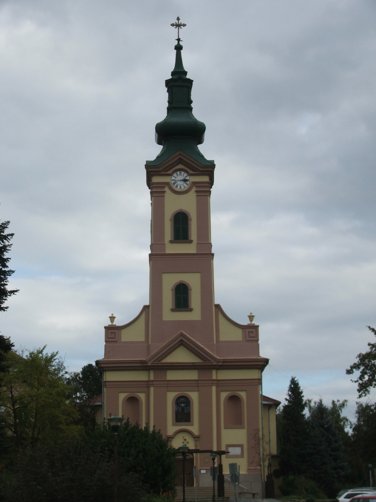 Felsővárosi Jézus Szíve r. k. templom (Nagykanizsa, Deák tér)